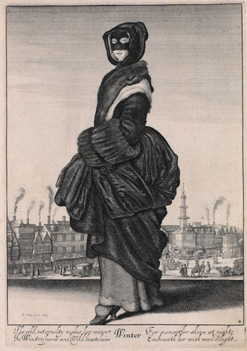 Česky: cyklus Roční doby - Zima